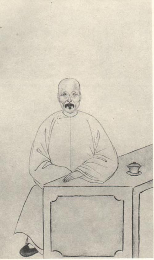 劉毓崧，清朝學者。Liu Yusong